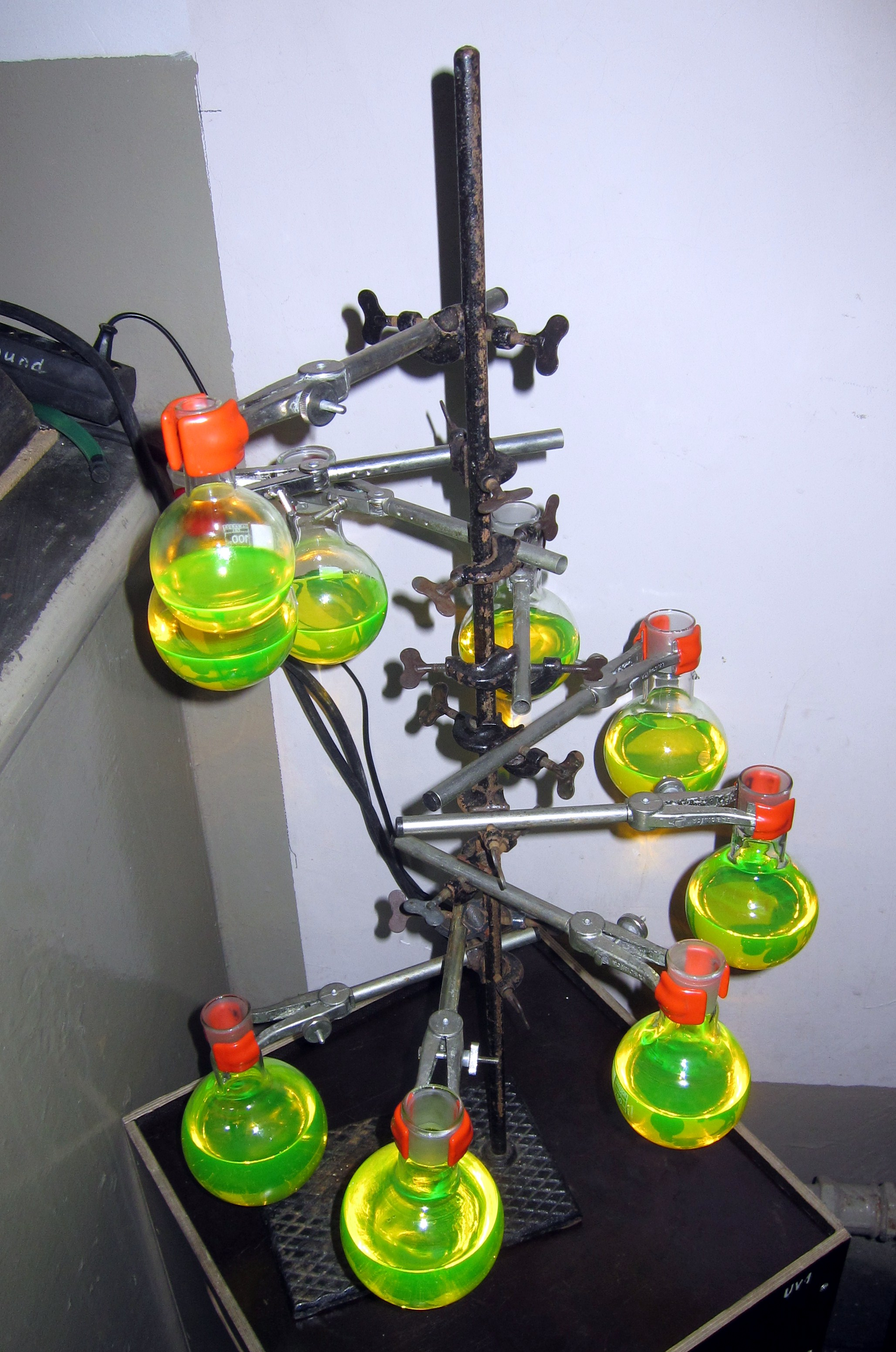 Statīvā iestiprinātas apaļkolbas ar luminiscējošu šķidrumu. Pasākuma "Staro Rīga - 2014" laikā LU Ķīmijas fakultātē.